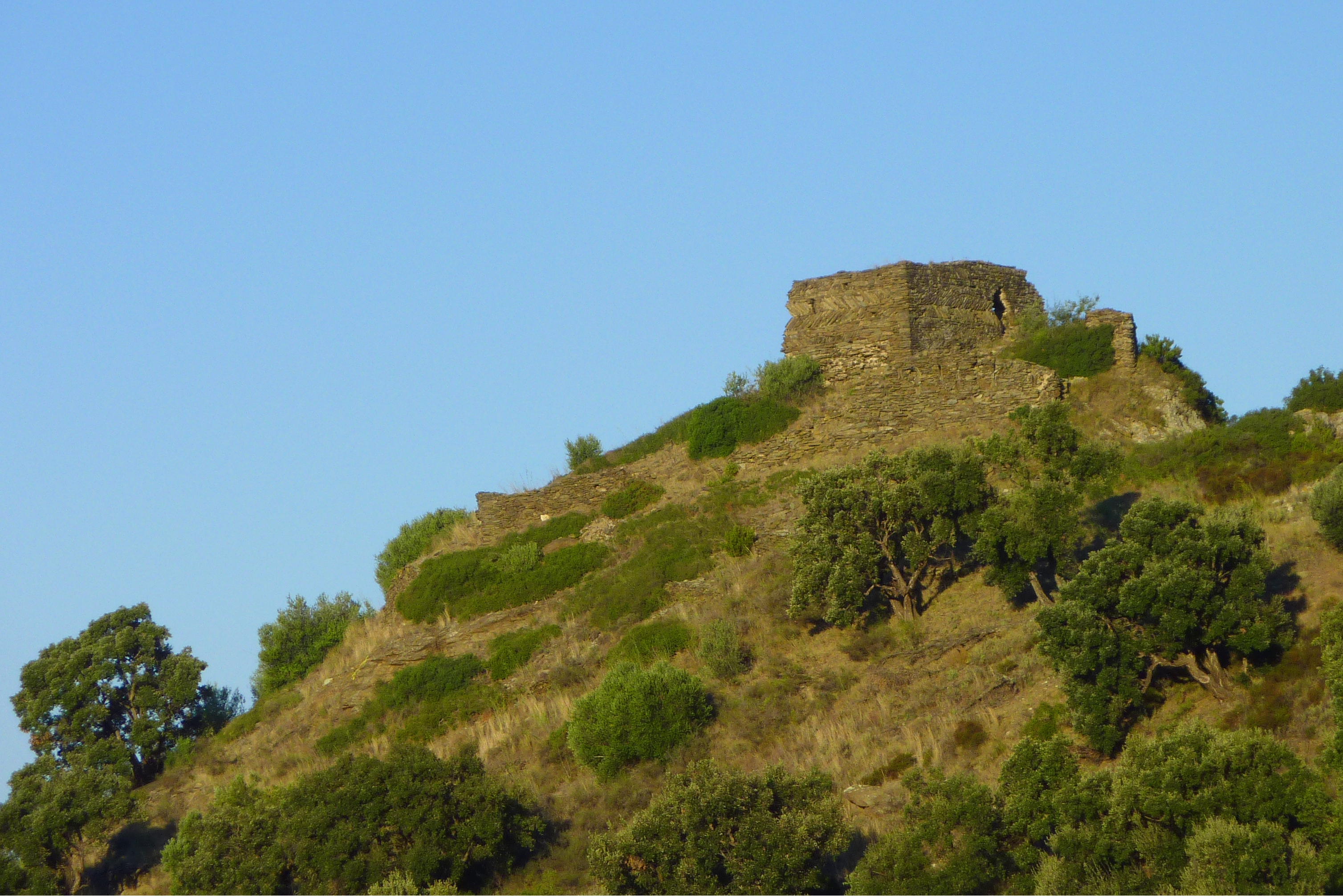 Castillo de Bufalaranya, de Bufraganyes o de Pinna Negra